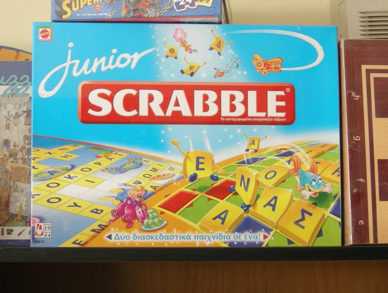 Het Junior Scrabblespel in het Grieks